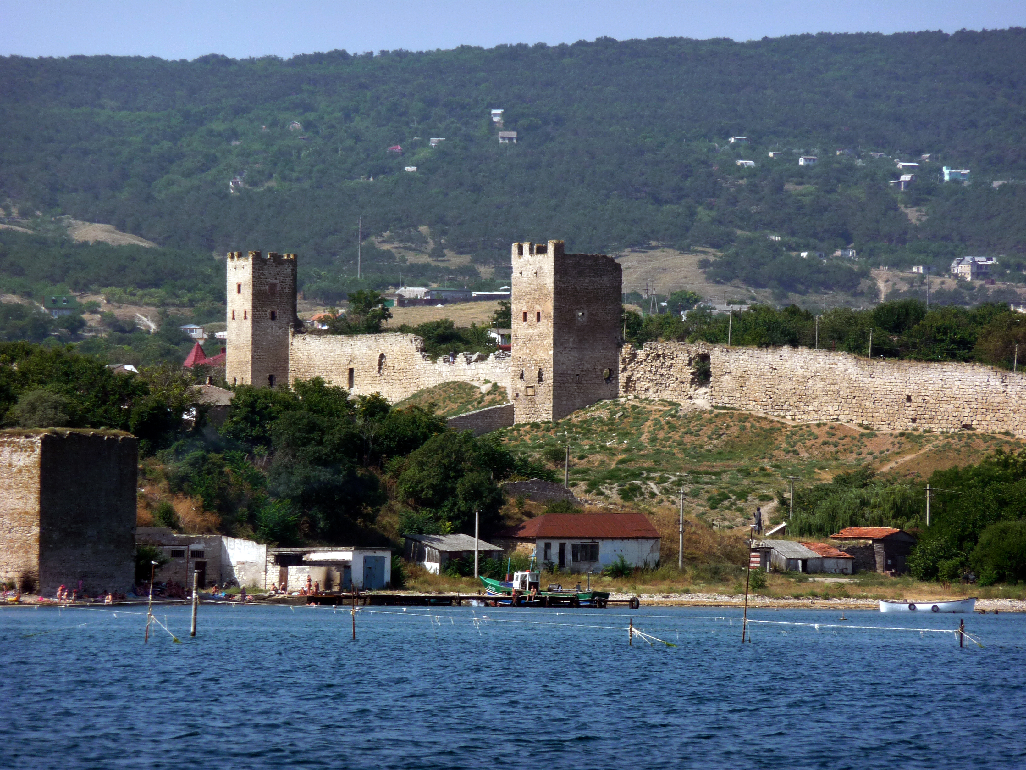 Генуезька фортеця (Карантин), Феодосія, південно-східна частина міста